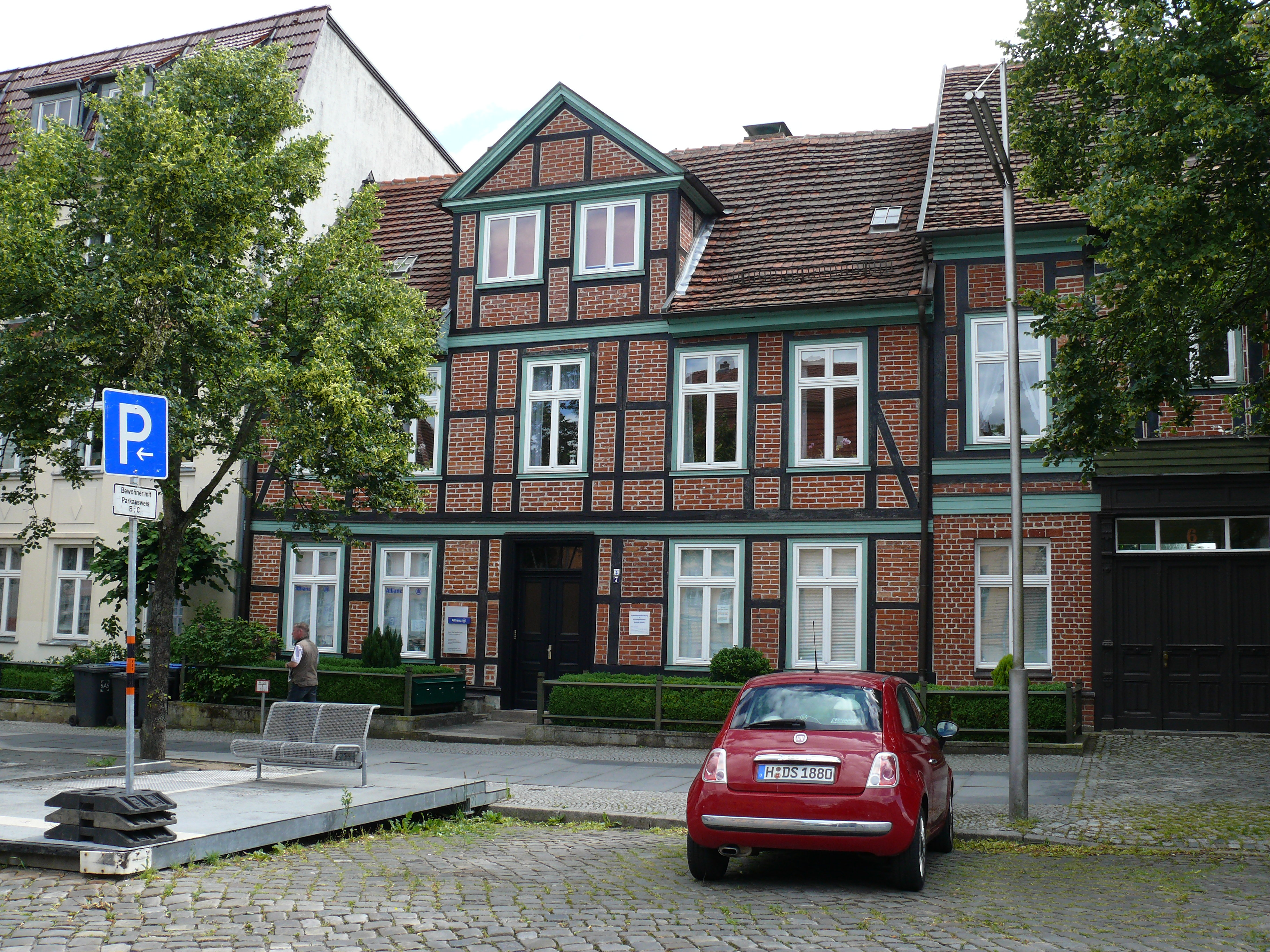 Das Gebäude "Schelfmarkt 7" in Schwerin.